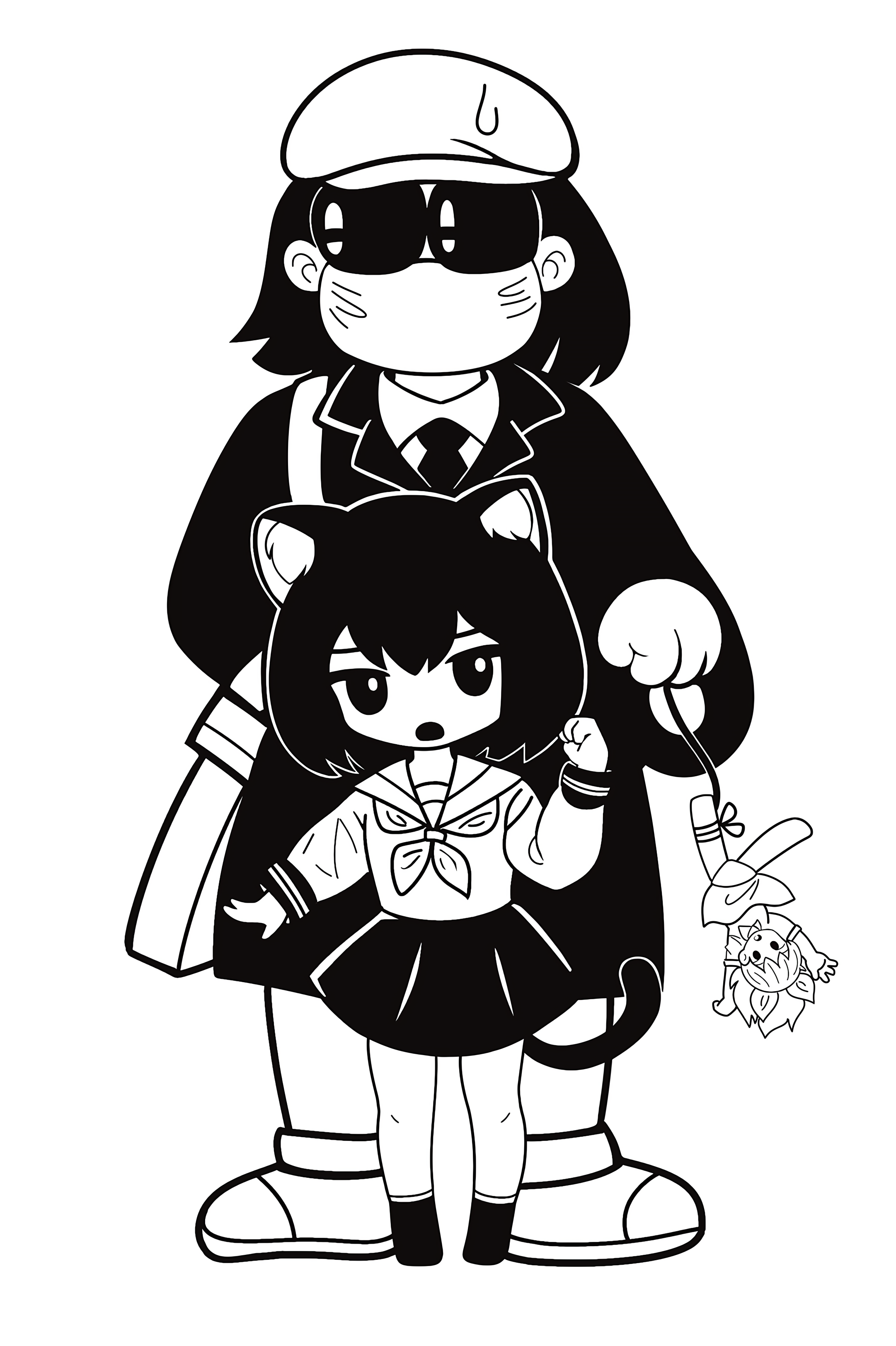 蛭児神建は、髪を腰まで伸ばし、ハンチング帽にサングラス、トレンチコートにマスク、少女の人形を逆さまにぶらさげた不気味ないでたち（いわゆる変質者のコスプレ）でコミックマーケット黎明期に出没していた伝説の「おたく」である。